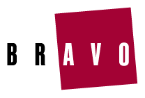 Logo de BRAVO